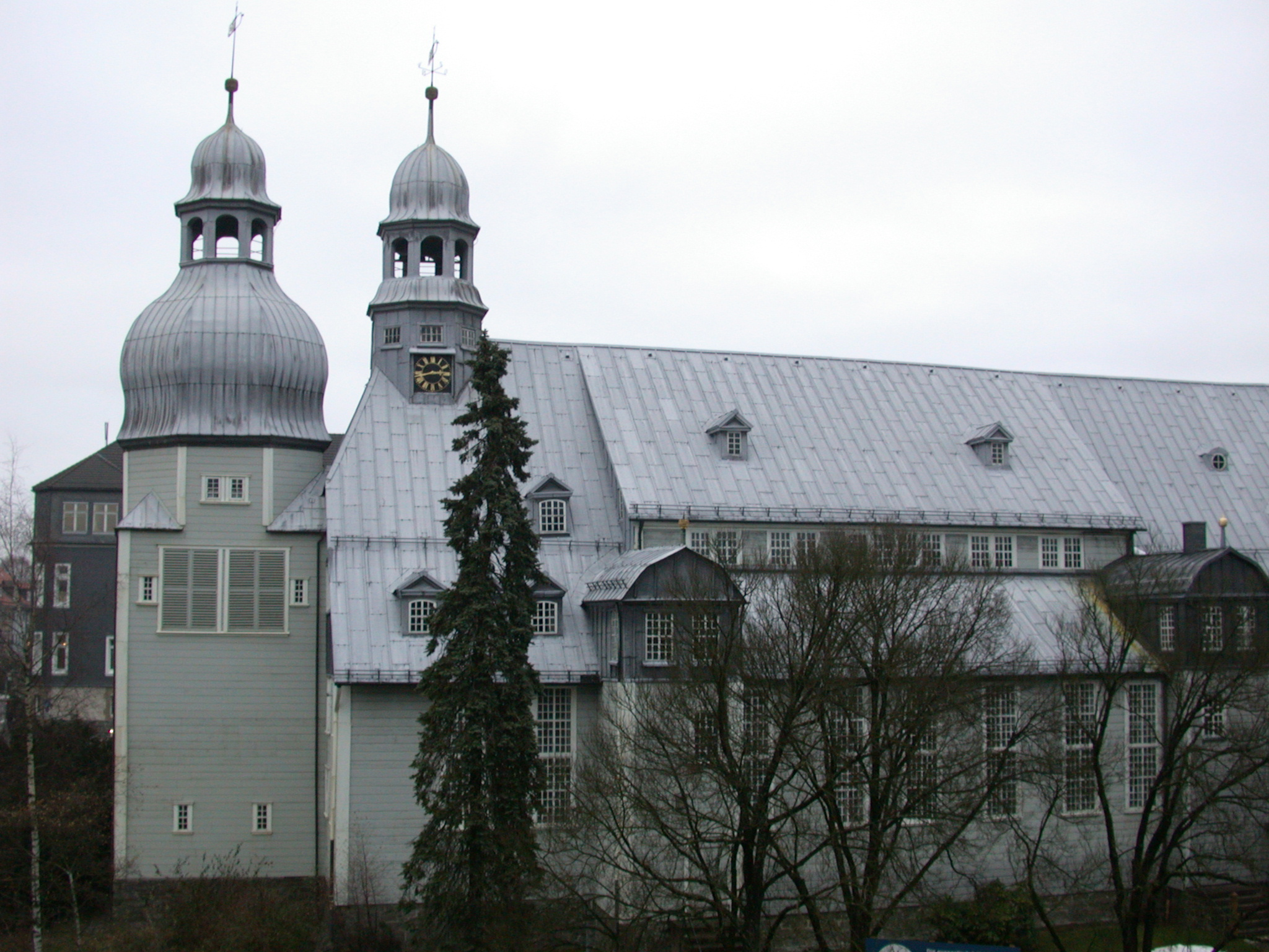 Marktkirche in Clausthal-Zellerfeld, Deutschland